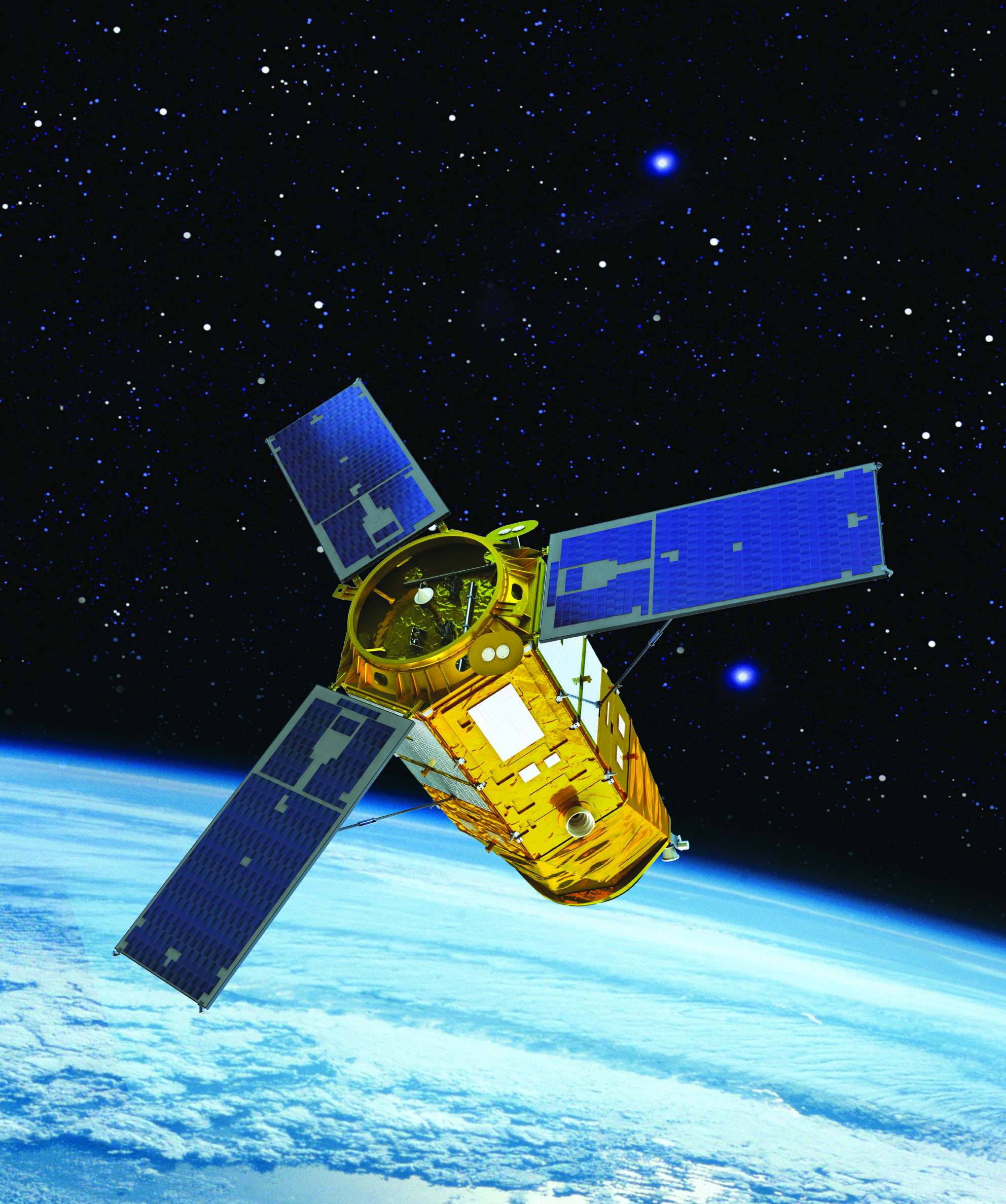 다목적실용위성(아리랑)3A호